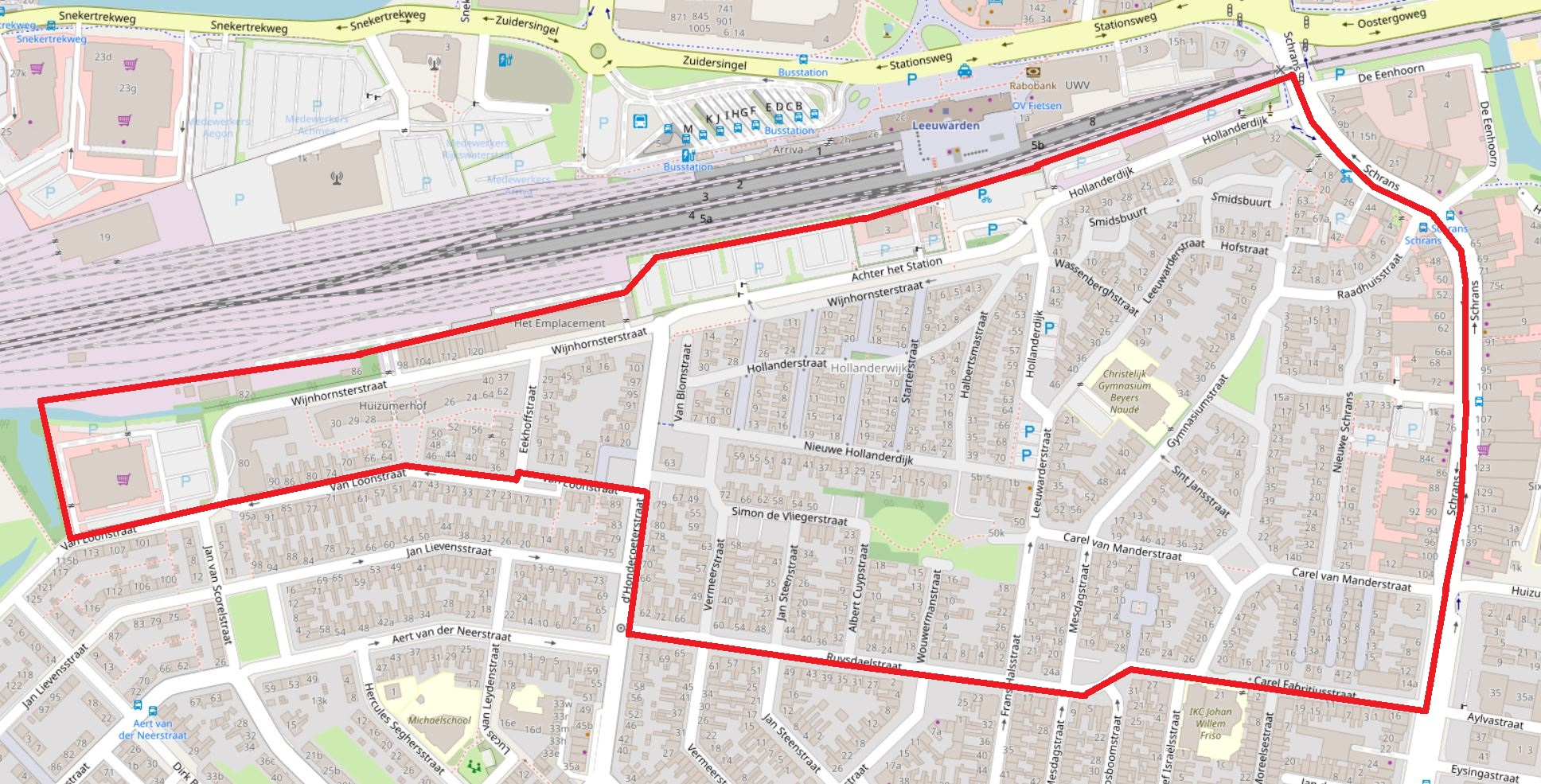 Hollanderwijk, wijk in Leeuwarden, kaart op basis van OpenStreetMap